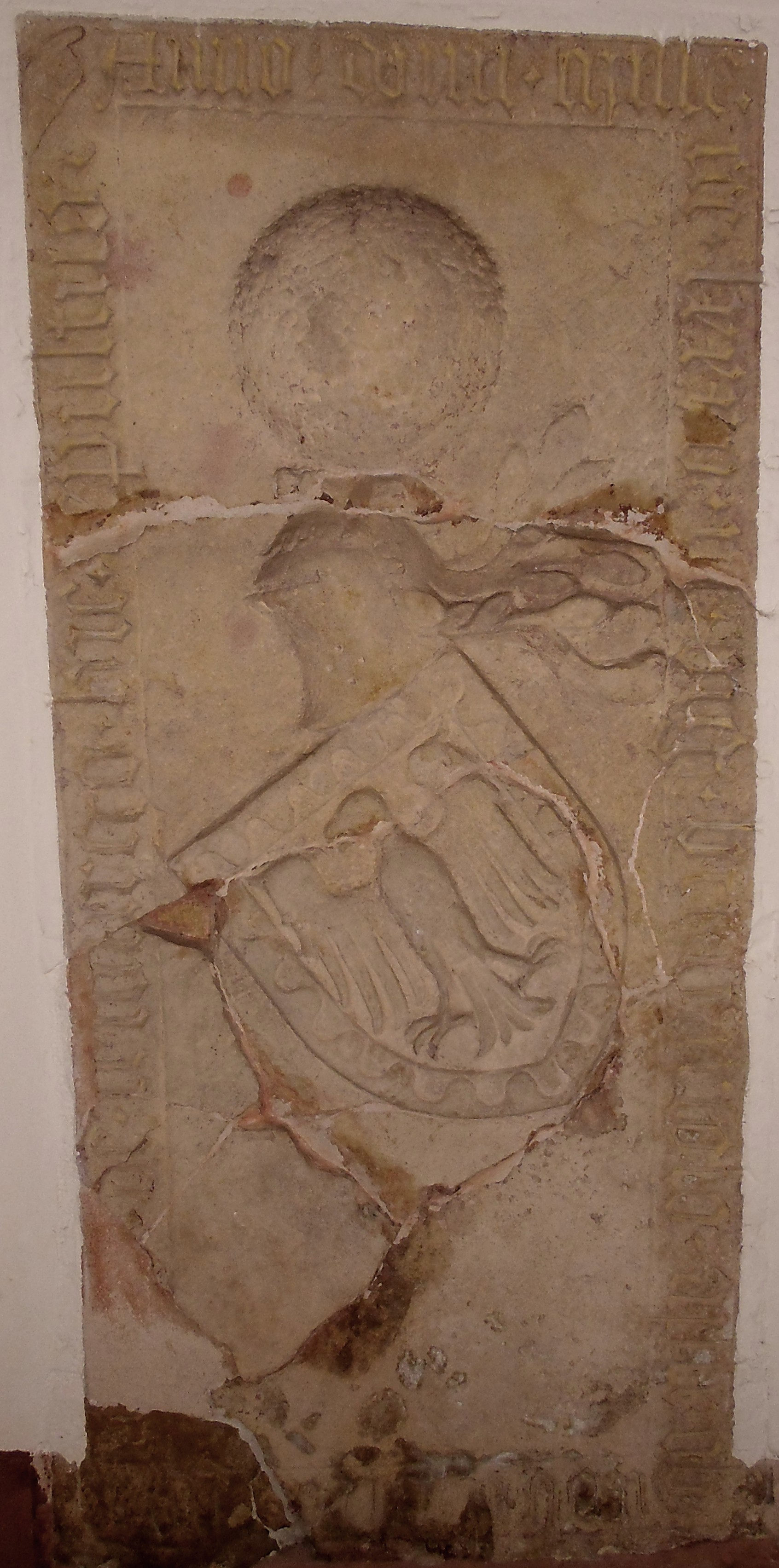 Epitaph des Egino III Graf von Freiburg in der Vorhalle der Pauluskirche von Badenweiler (2,45 m hoch, 1,13 m breit). Umlaufende Schrift gemäss dort angebrachter Tafel: "ANNO DOMINI IN MILLECCCLXXXV VIGILIA STI: BARTOLO OBIT DOMINUS EGENO COMES DE FRIBURGO HIC SEPTULUS; d.h. Im Jahre des Herrn 1385, am Tage vor Sankt Bartolomei (=23.8.1385) starb der hochherrschaftliche Egeno, Graf von Freiburg, der hier begraben liegt." siehe auch: Franz Xaver Kraus: Die Kunstdenkmäler des Großherzogthums Baden, Tübingen und Leipzig, 1901, Fünfter Band - Kreis Lörrach; S. 80 online